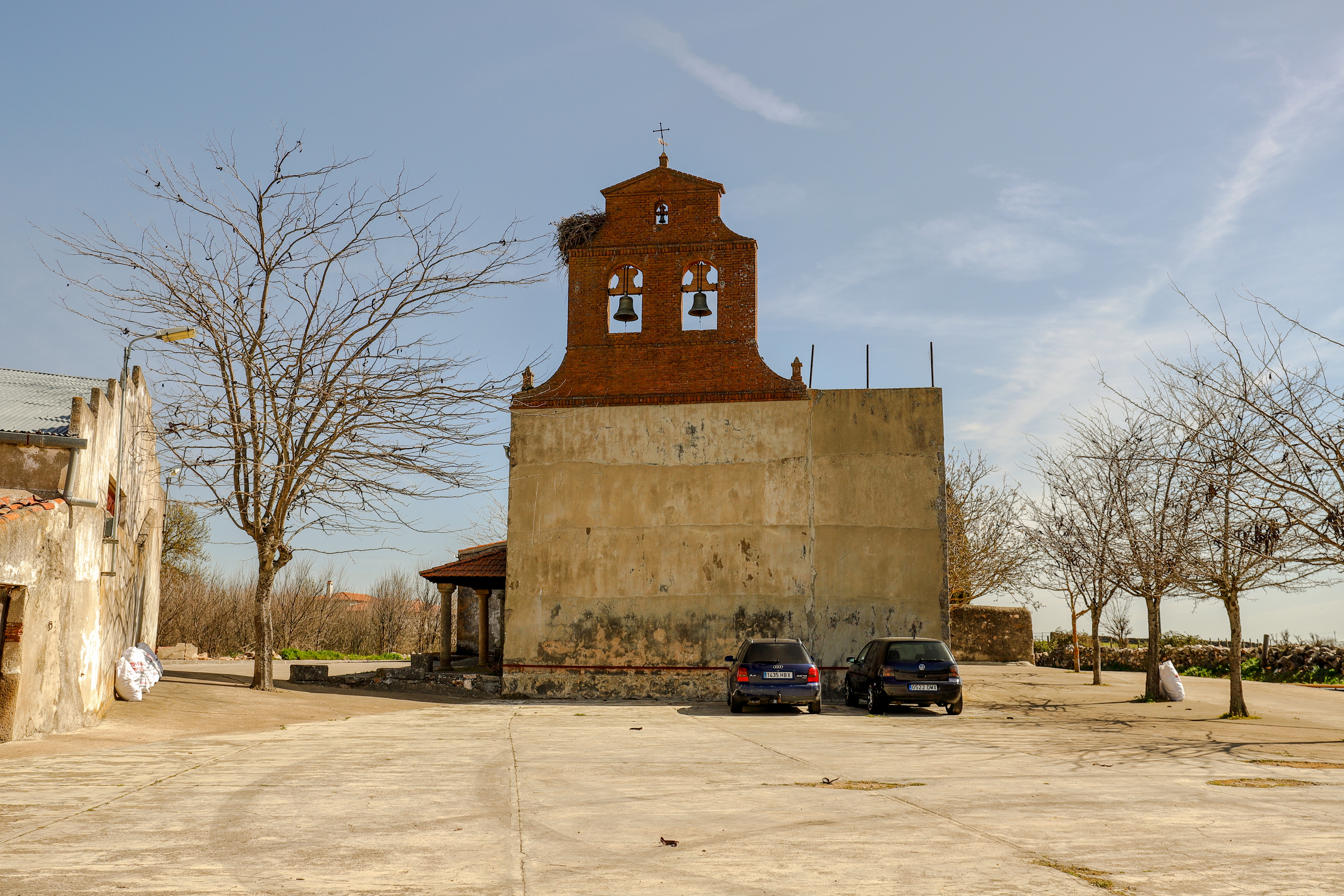 Garcirrey es un municipio de la comarca Campo de Salamanca, provincia de Salamanca.